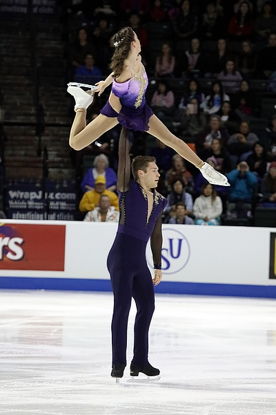 Эвелин Уолш и Треннт Мишо на этапе Гран-при Skate America 2018